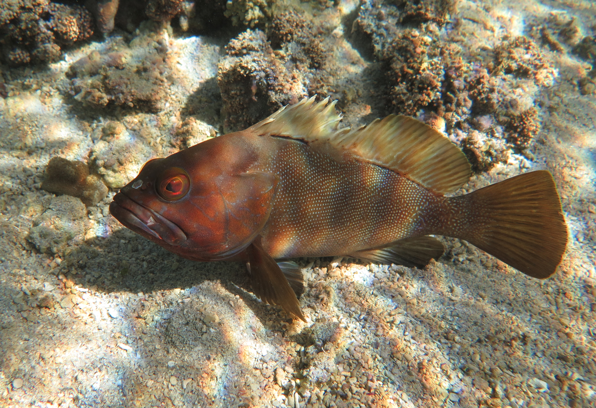 Un mérou demi-lune (Epinephelus rivulatus) à la Réunion.